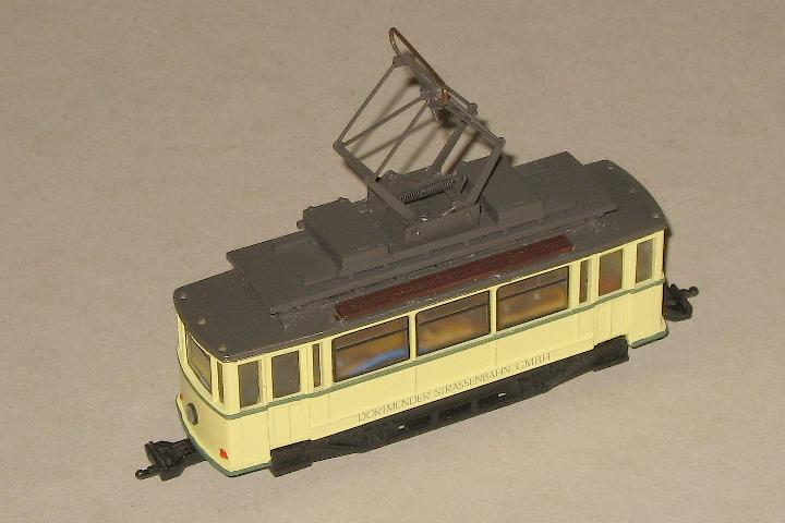 Strassenbahn Modell in der Nenngrösse H0, Spur H0, der Dortmunder Strassenbahn der Firma Gogtram.